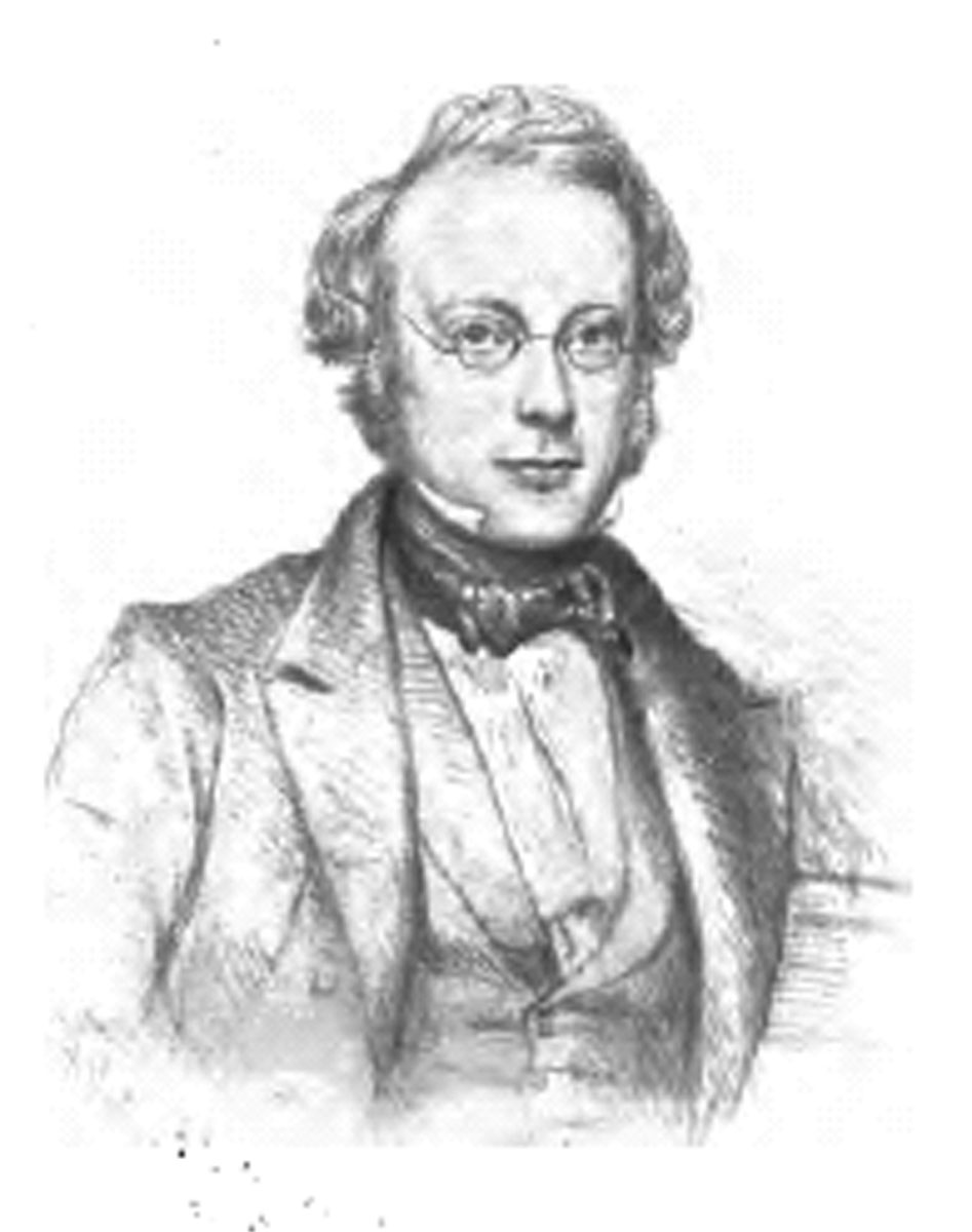 Sir Samuel Ferguson (1810 – 1886), in his younger days